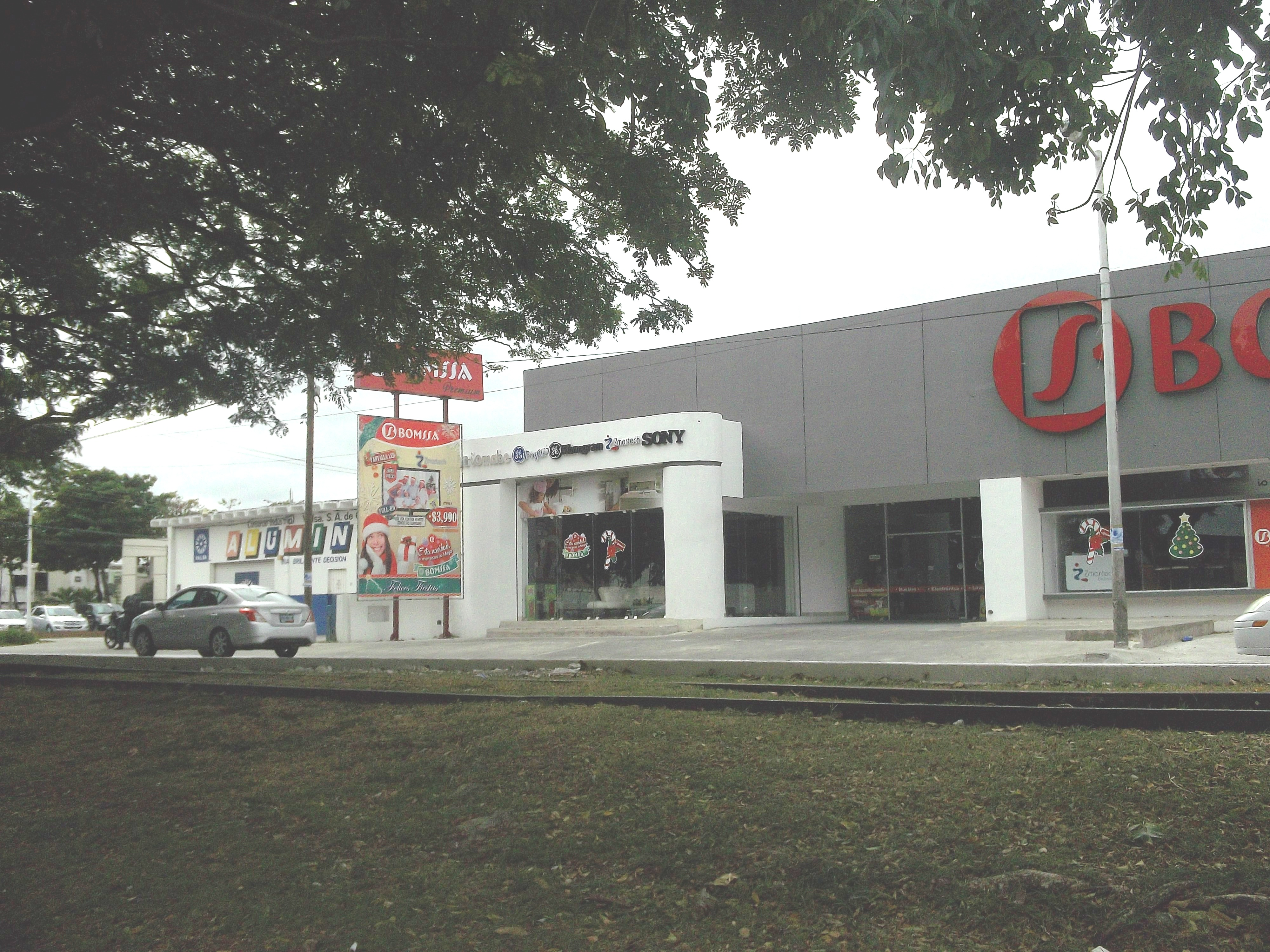 Tienda de electrodomésticos con ofertas navideñas en Yucatán.